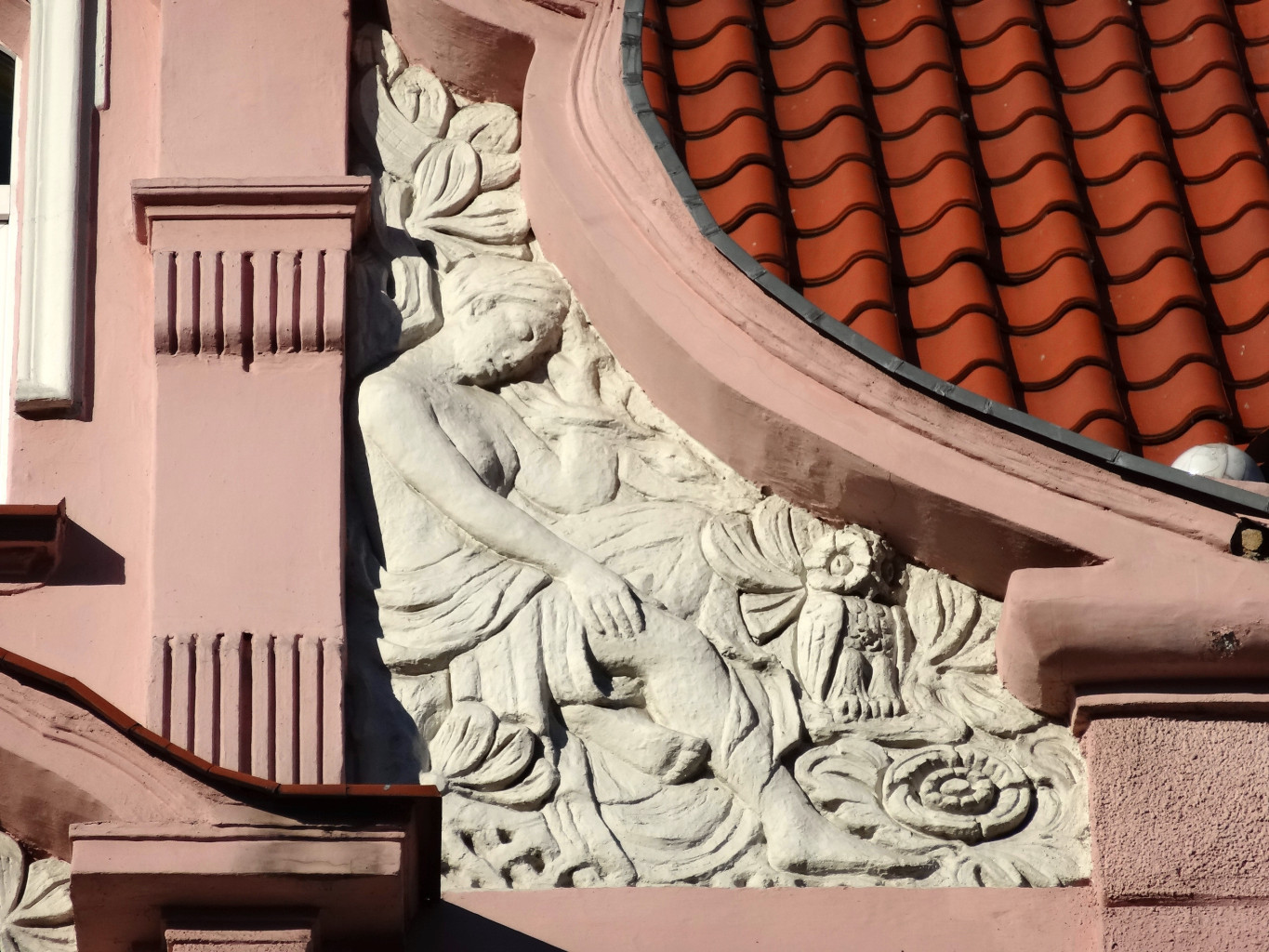 Kamienica przy ul. Cieszkowskiego 9 w Bydgoszczy (1900-1902, Karl Bergner)